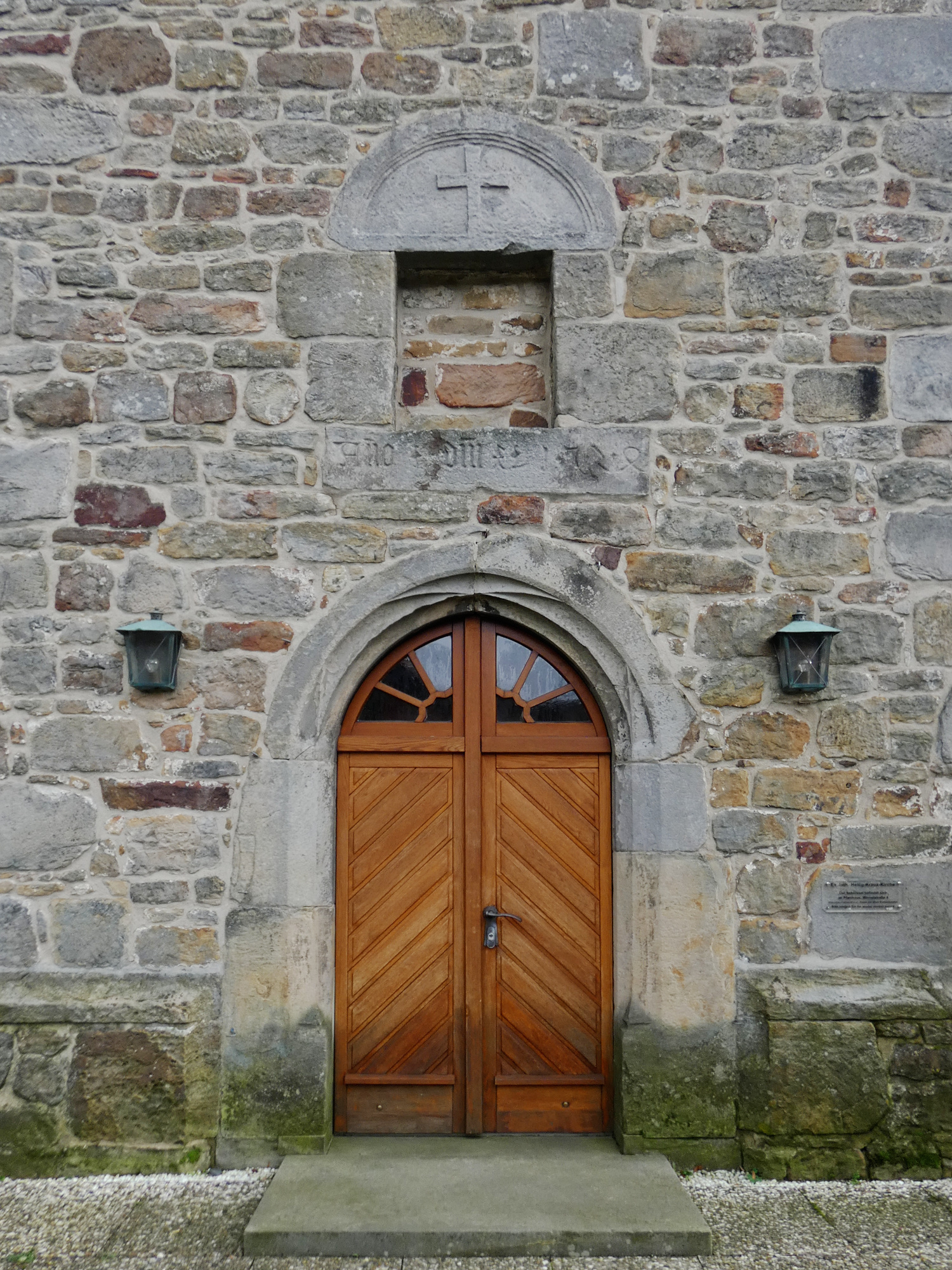 Eingangstür der Heilig-Kreuz-Kirche in Kirchdorf, Stadt Barsinghausen,Region Hannover, Niedersachsen